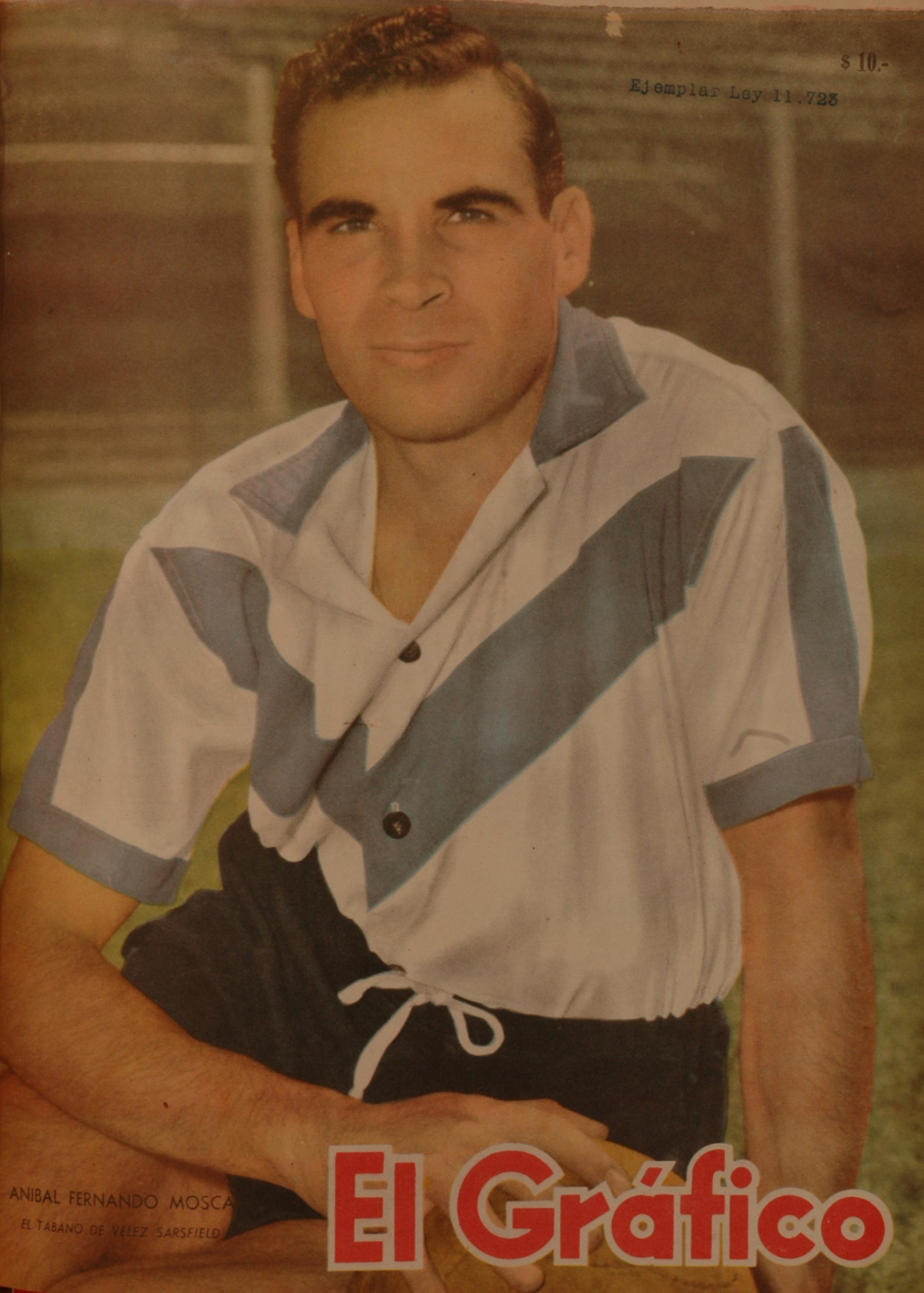 El Grafico del 04 de Mayo de 1960. Edicion 2119